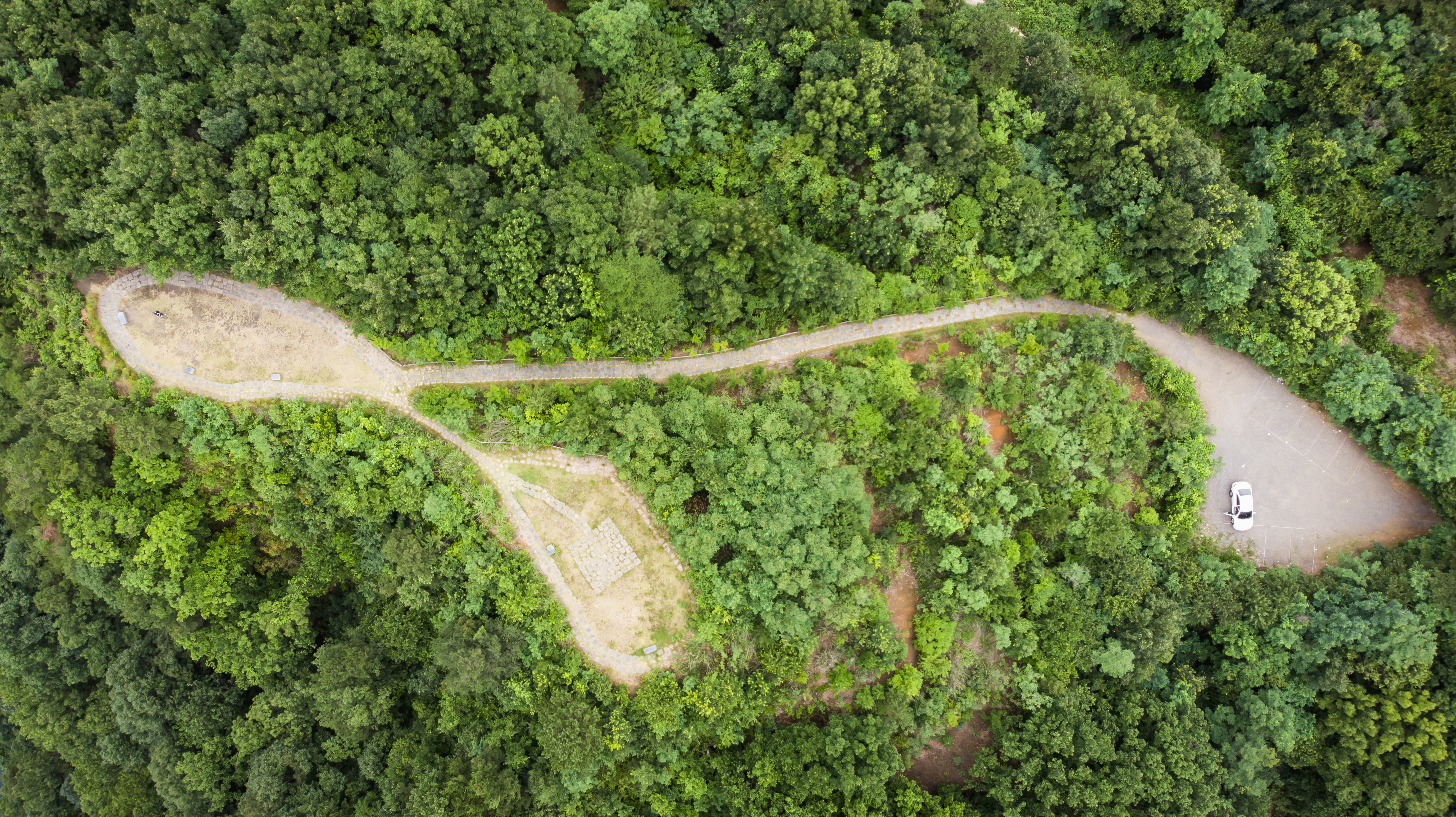 대청호오백리길 3구간_3